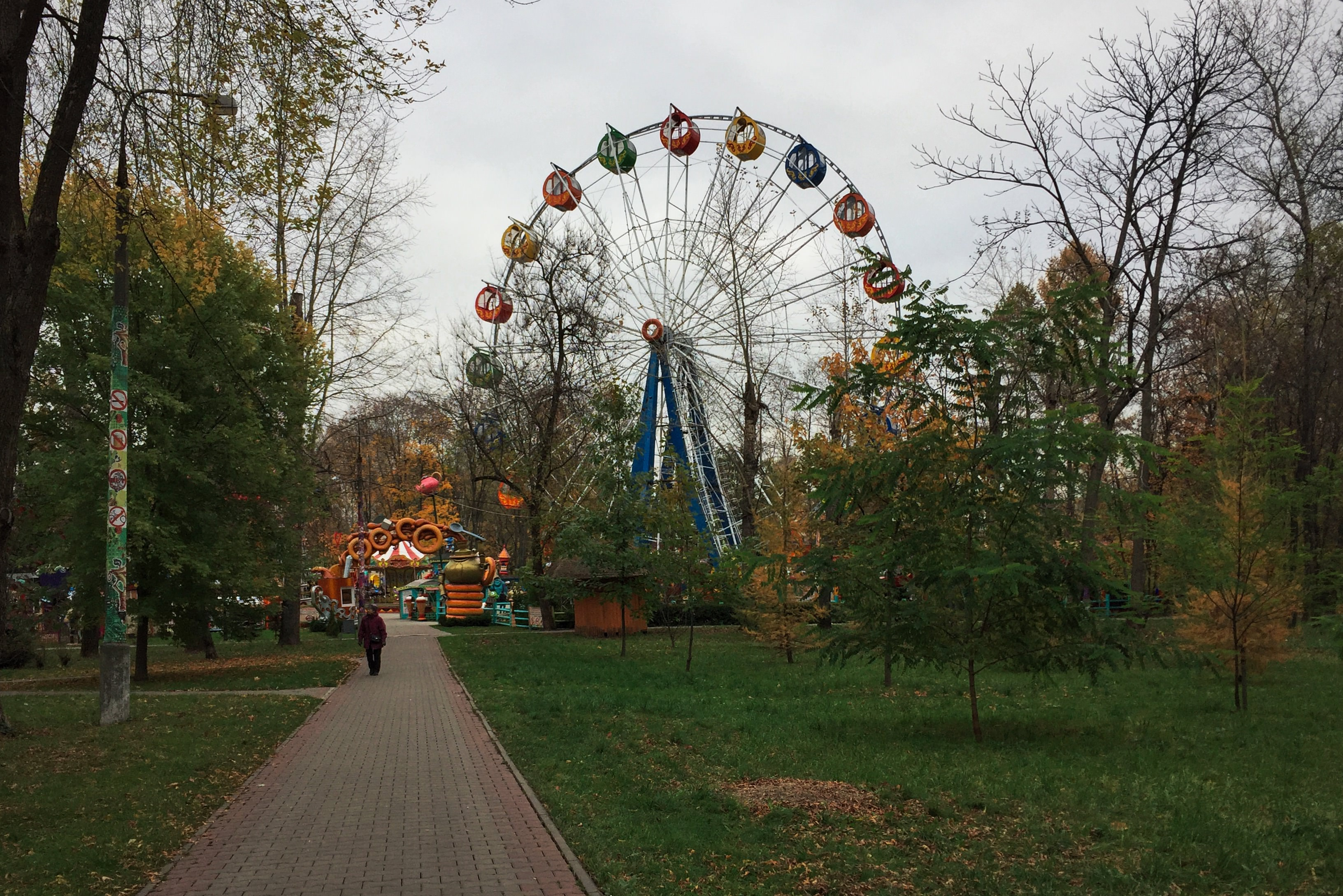 Мытищи. Улица Мира. Мытищинский парк культуры и отдыха Moscow in 2016; Москва в 2016